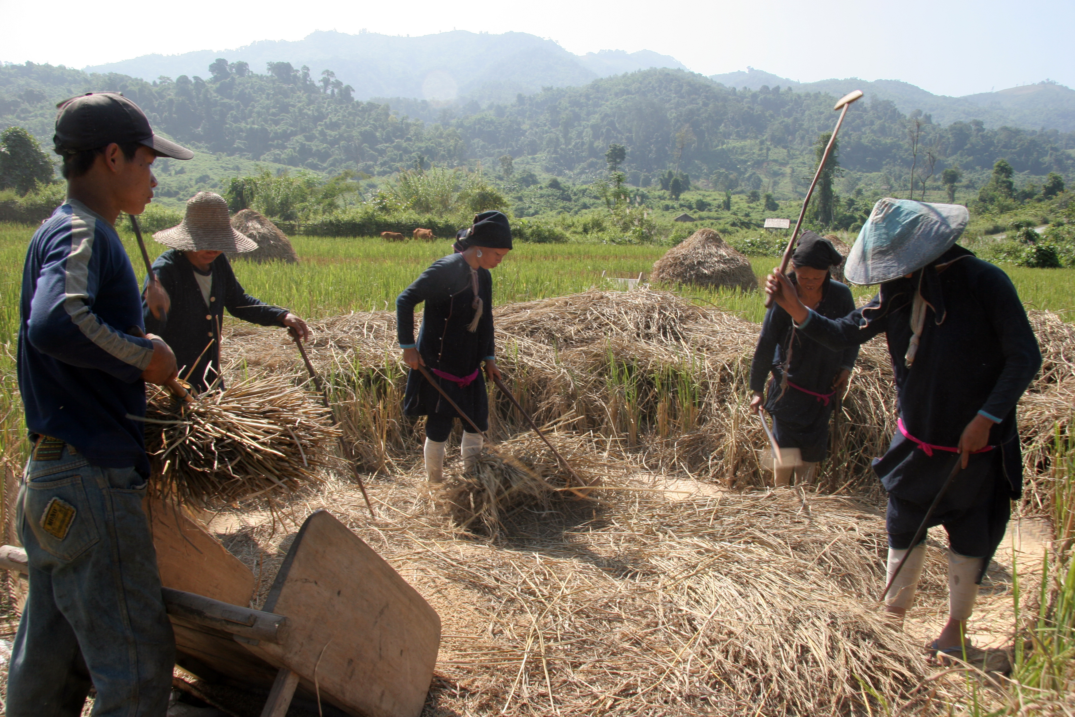 Laos région de muang sing femmes lenten dans un champs pour le battage du riz